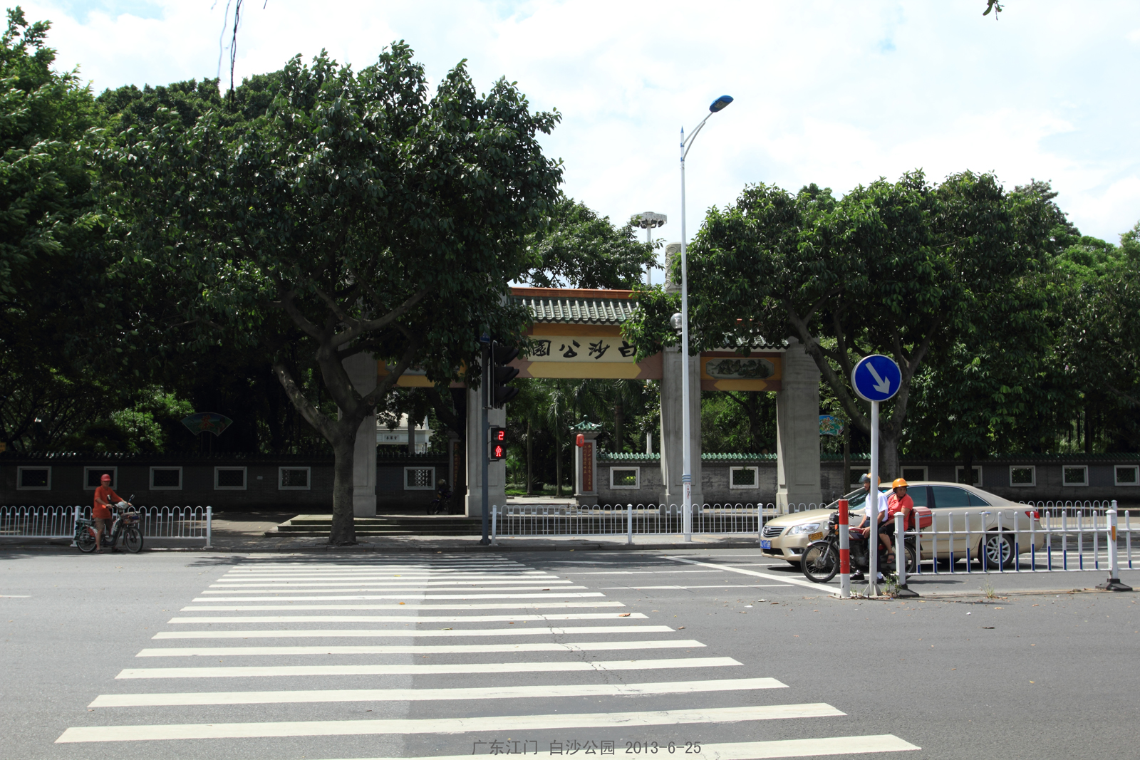 江会路与环市三路路口